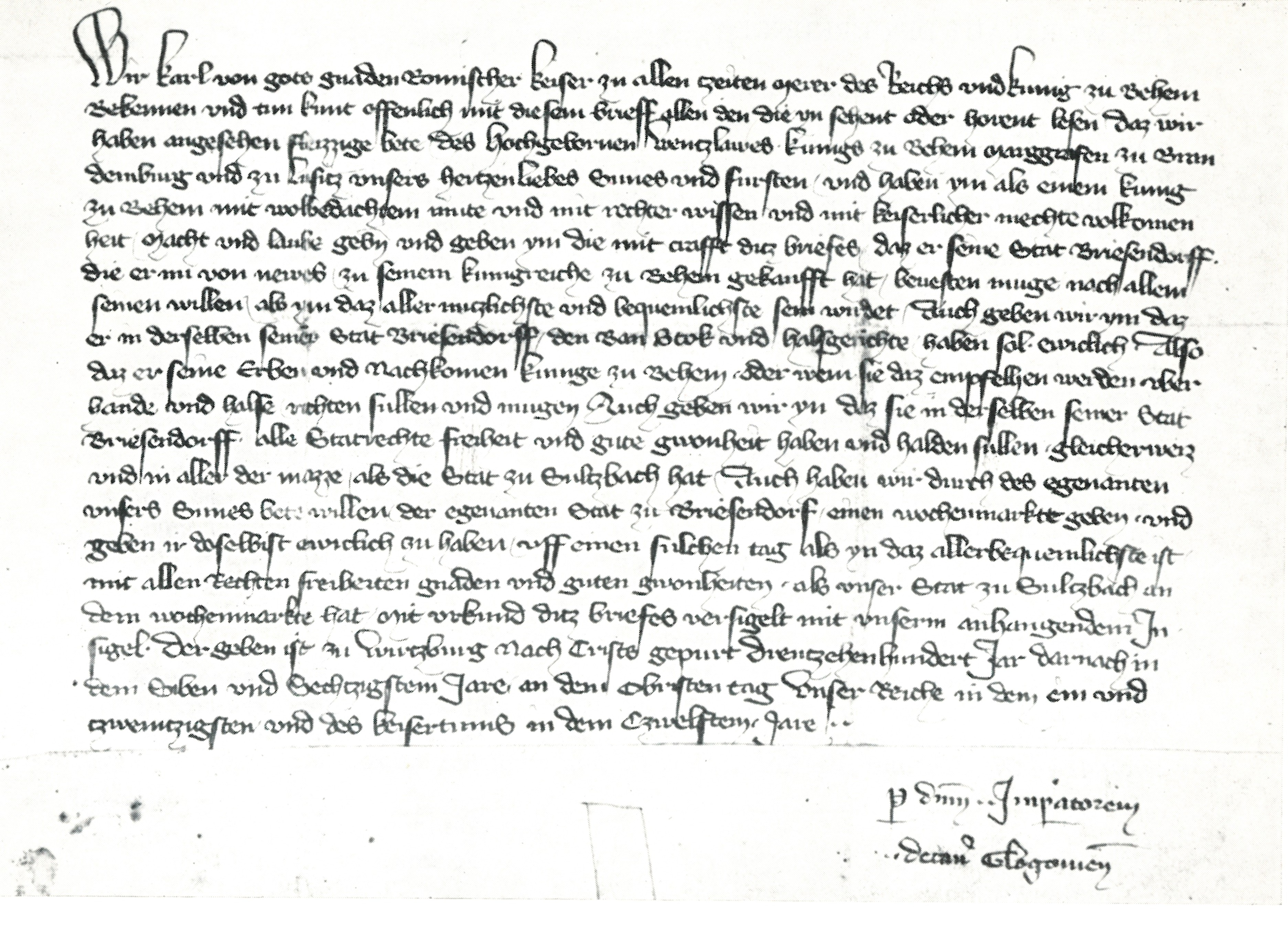 Urkunde vom 6. Januar 1367. Verleihung der Stadtrechte an "Briesendorf", durch Kaiser Karl IV. "Wir Karl, von Gottes Gnaden Römischer Kaiser, zu allen Zeiten Mehrer des Reichs [...] mit Kraft dieses Briefes, [...] Stadtrechte, Freiheit und gute Gewohnheit haben und halten sollen gleicherweise und in aller der Maße, als die Stadt zu Sulzbach hat."